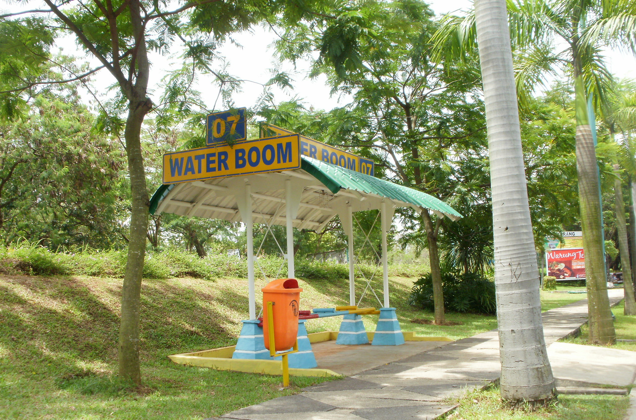 Perhentian bus di Water Boom Lippo Cikarang